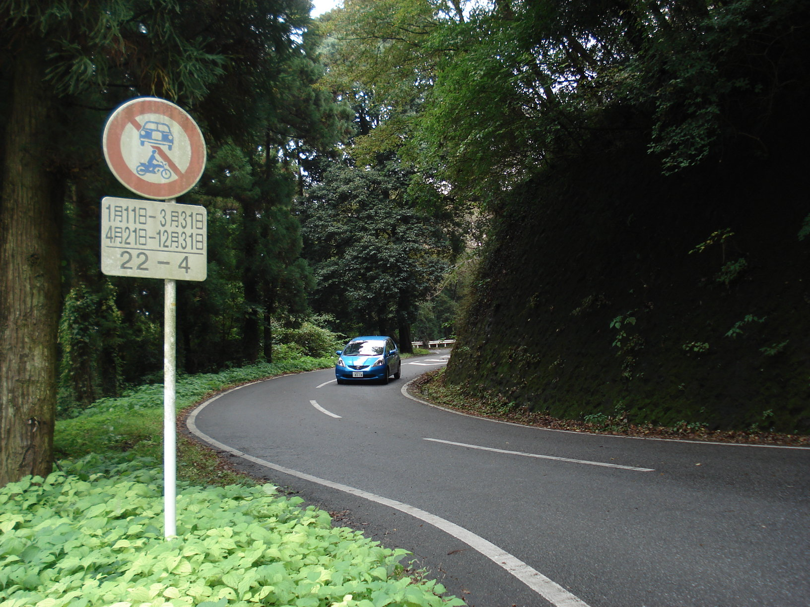 太平山周遊道路 平井町側登山口